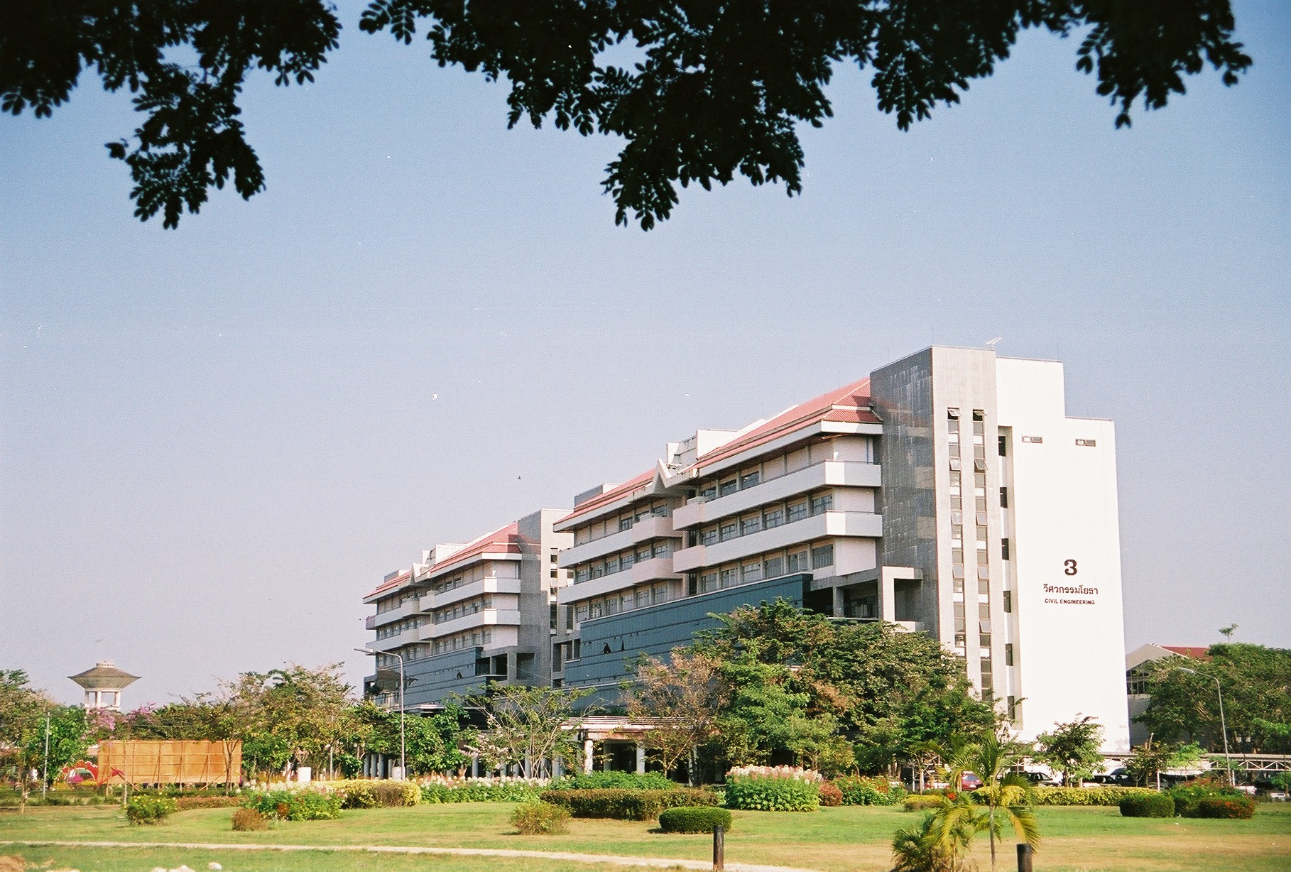 NU_Engineering_building